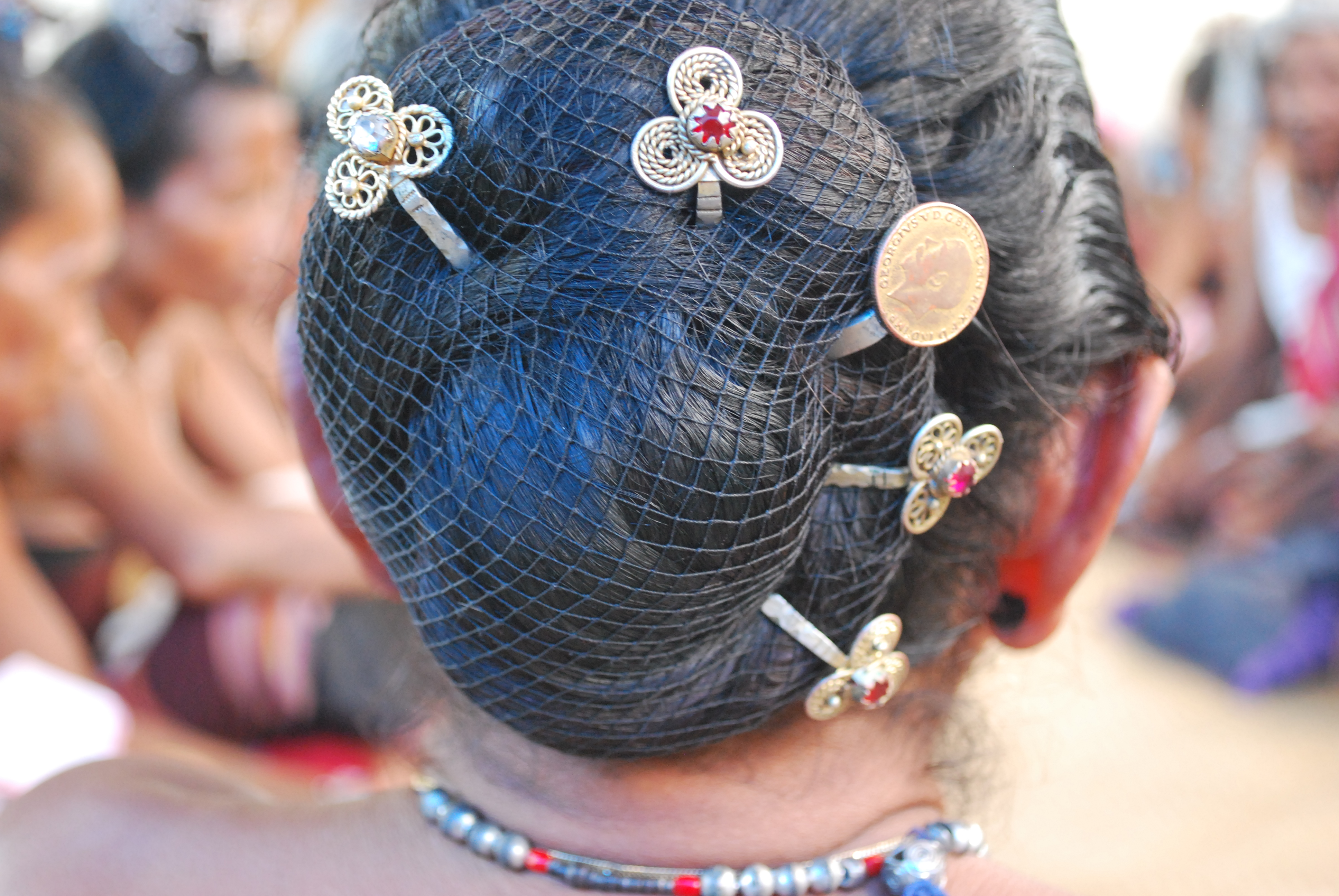 Haarschmuck von Tänzerinnen in Viqueque